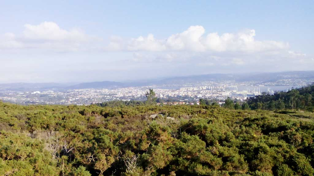 Ferrol visto dende Brión.